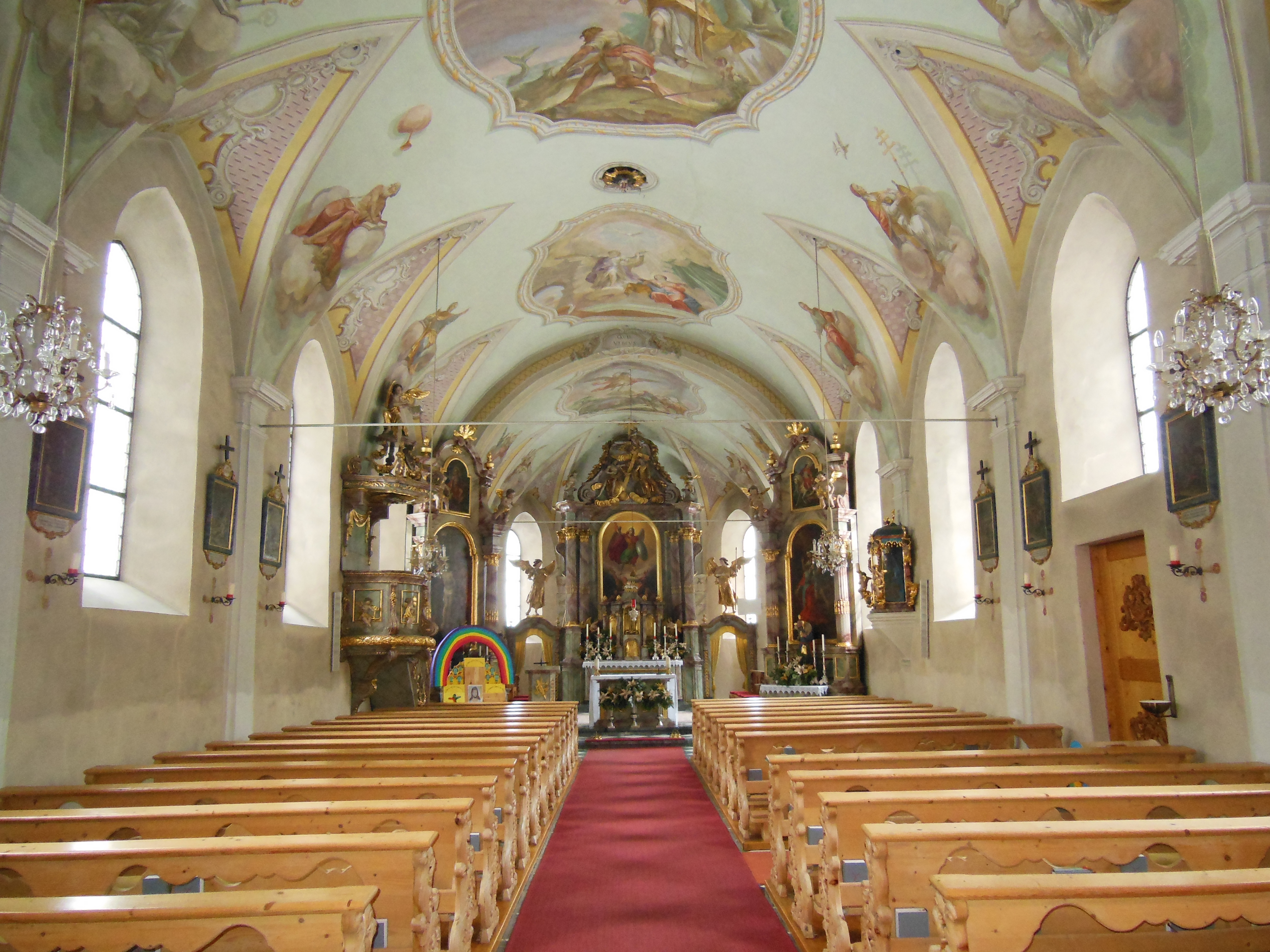 Kath. Pfarrkirche hl. Michael